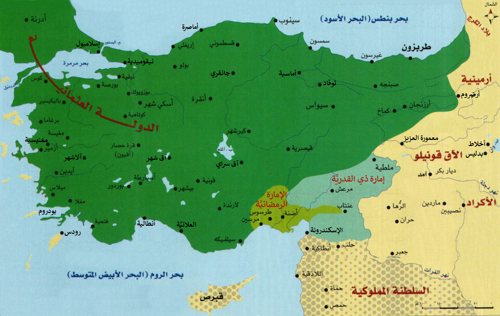 المناطق الحُدُوديَّة بين السلطنتان العُثمانيَّة والمملوكيَّة وإمارتا ذي القدريَّة والرمضانيَّة، زمن السُلطانين مُحمَّد الفاتح وبايزيد الثاني.